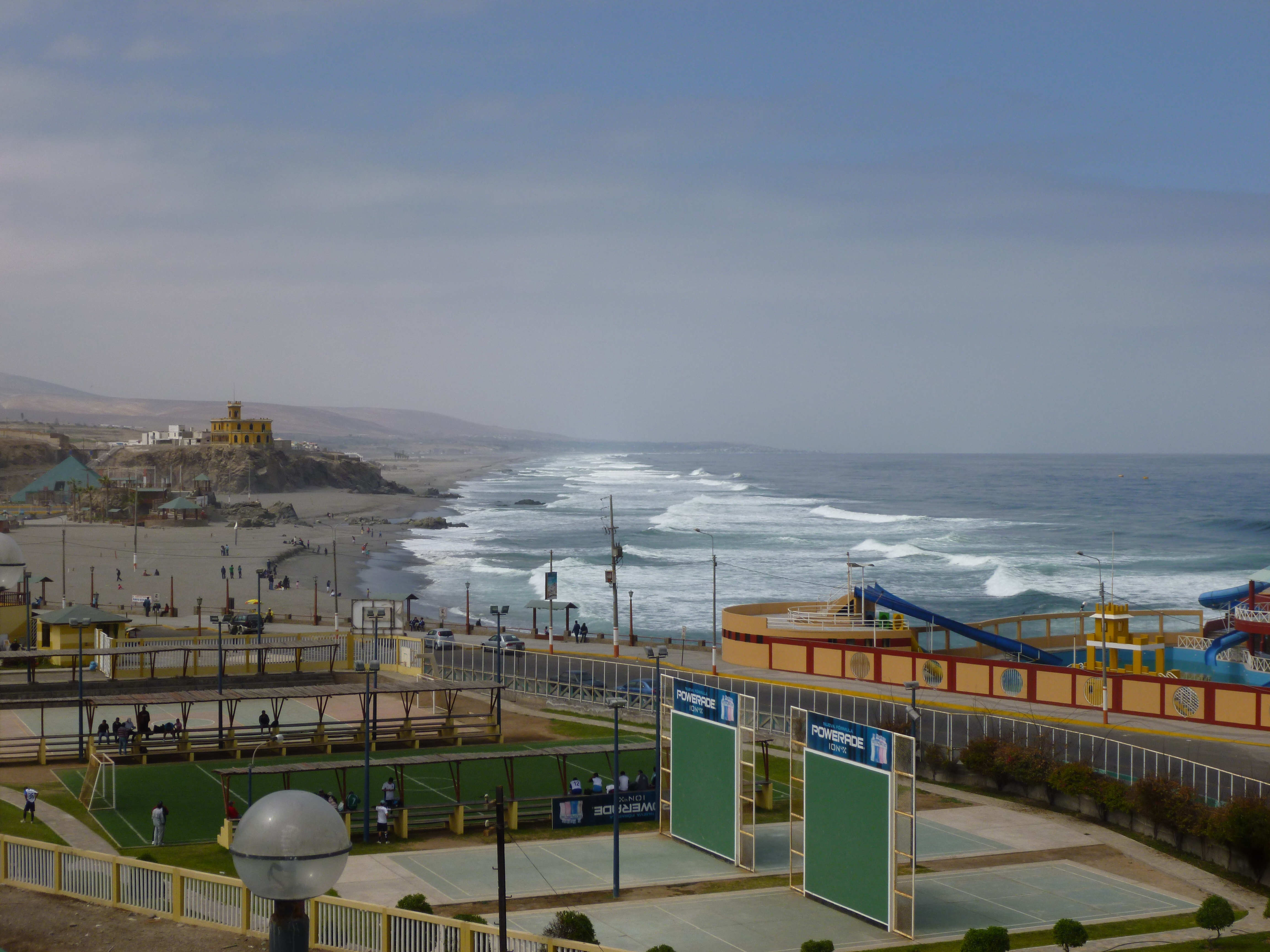 Playa 1, Mollendo durante la temporada de Invierno.